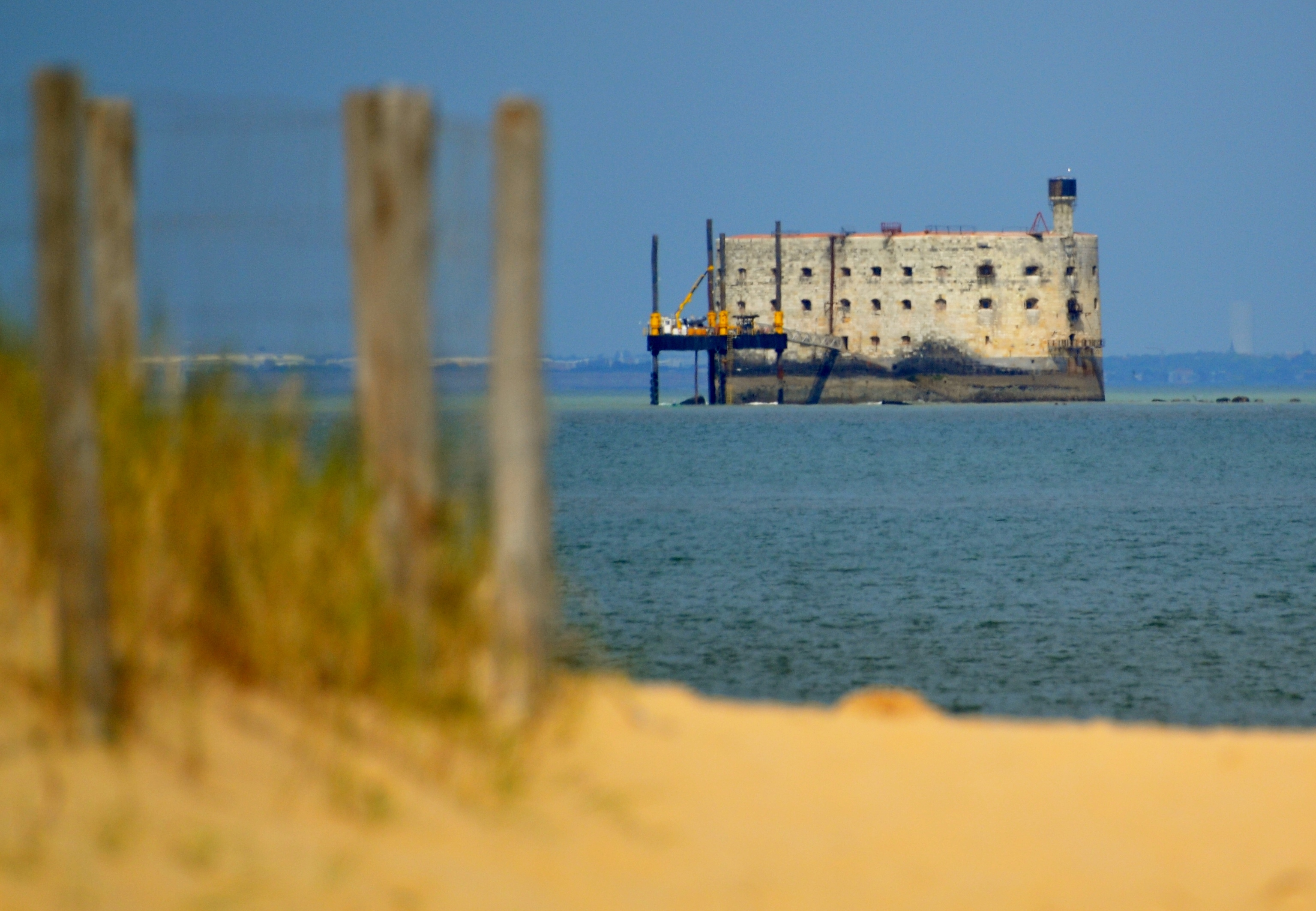 plage de boyard ville